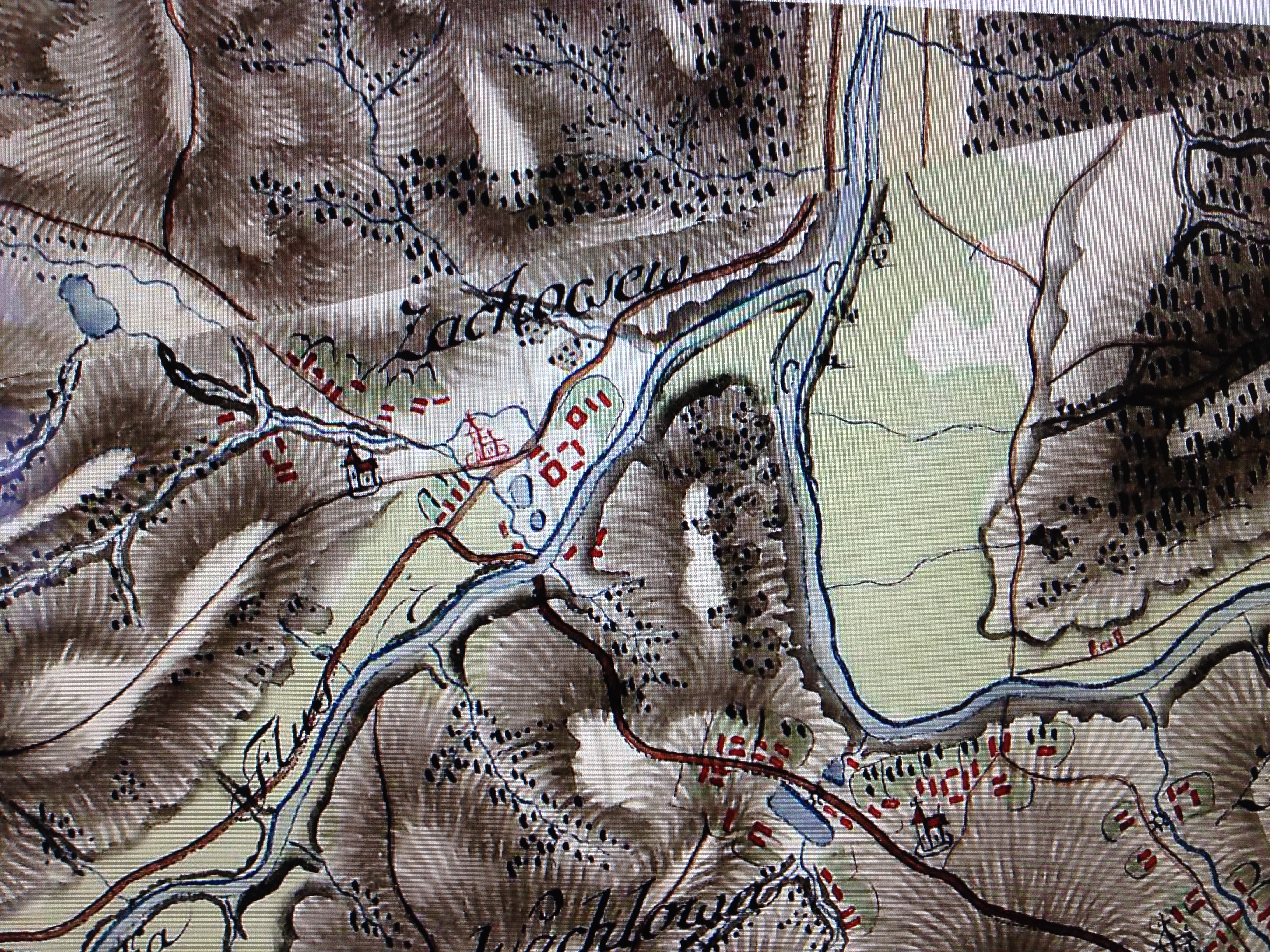 фрагмент карти 1779 року - Загочев'я